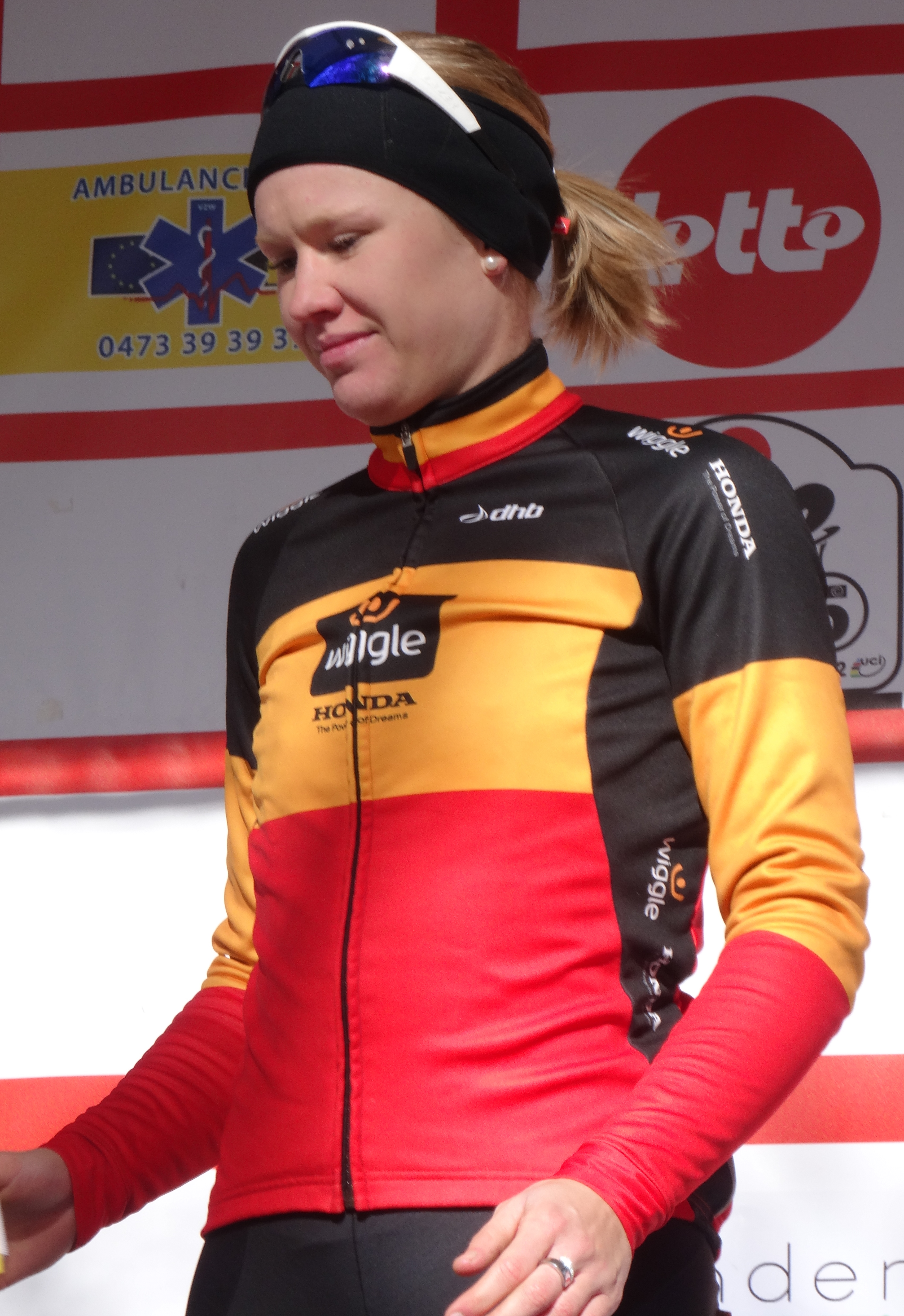 Reportage réalisé le mercredi 4 mars à l'occasion de l'arrivée du Samyn des Dames 2015 et du Samyn 2015 à Dour, Belgique.